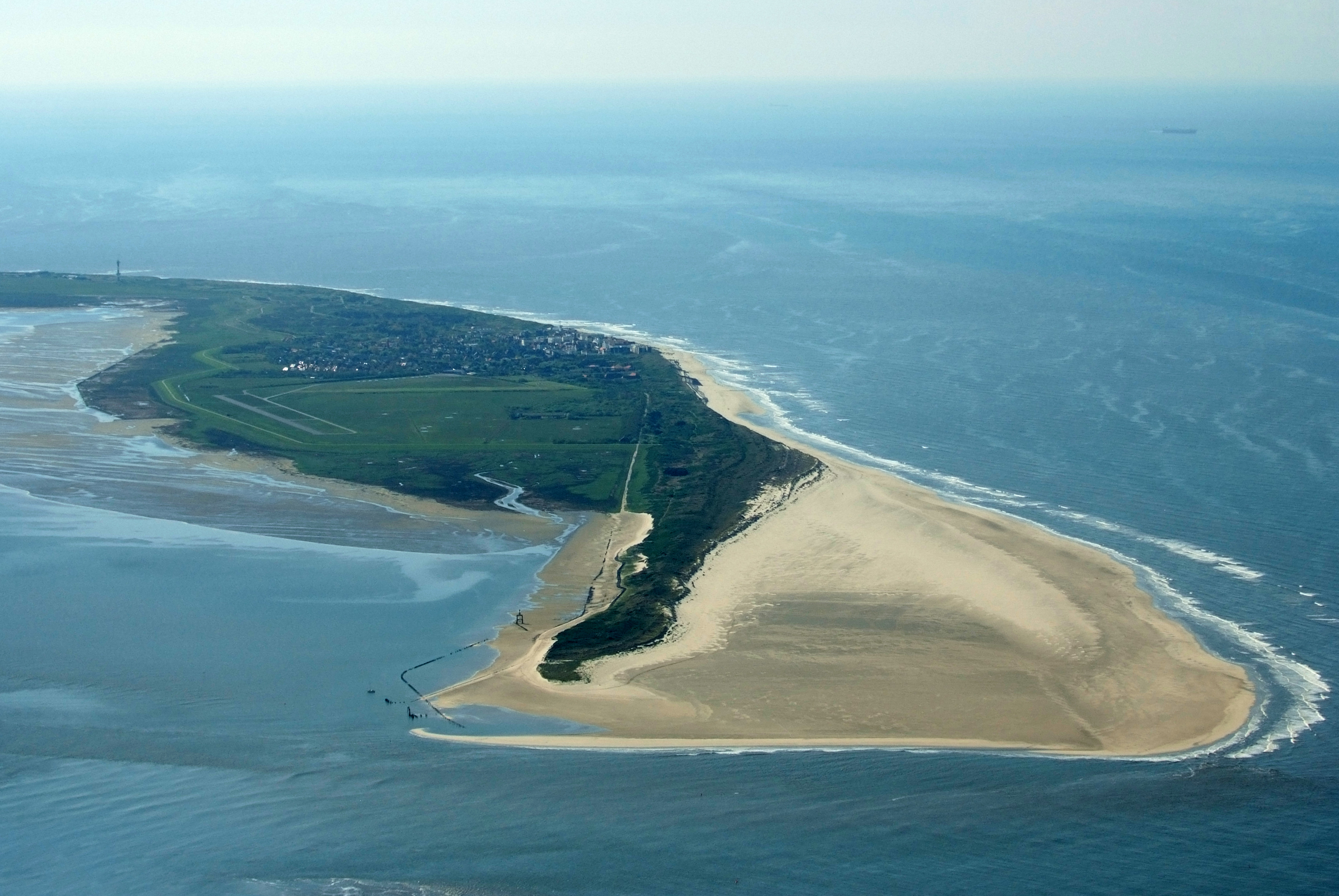 Fotoflug vom Flugplatz Nordholz-Spieka über Bremerhaven, Wilhelmshaven und die Ostfriesischen Inseln bis Borkum Wangerooge